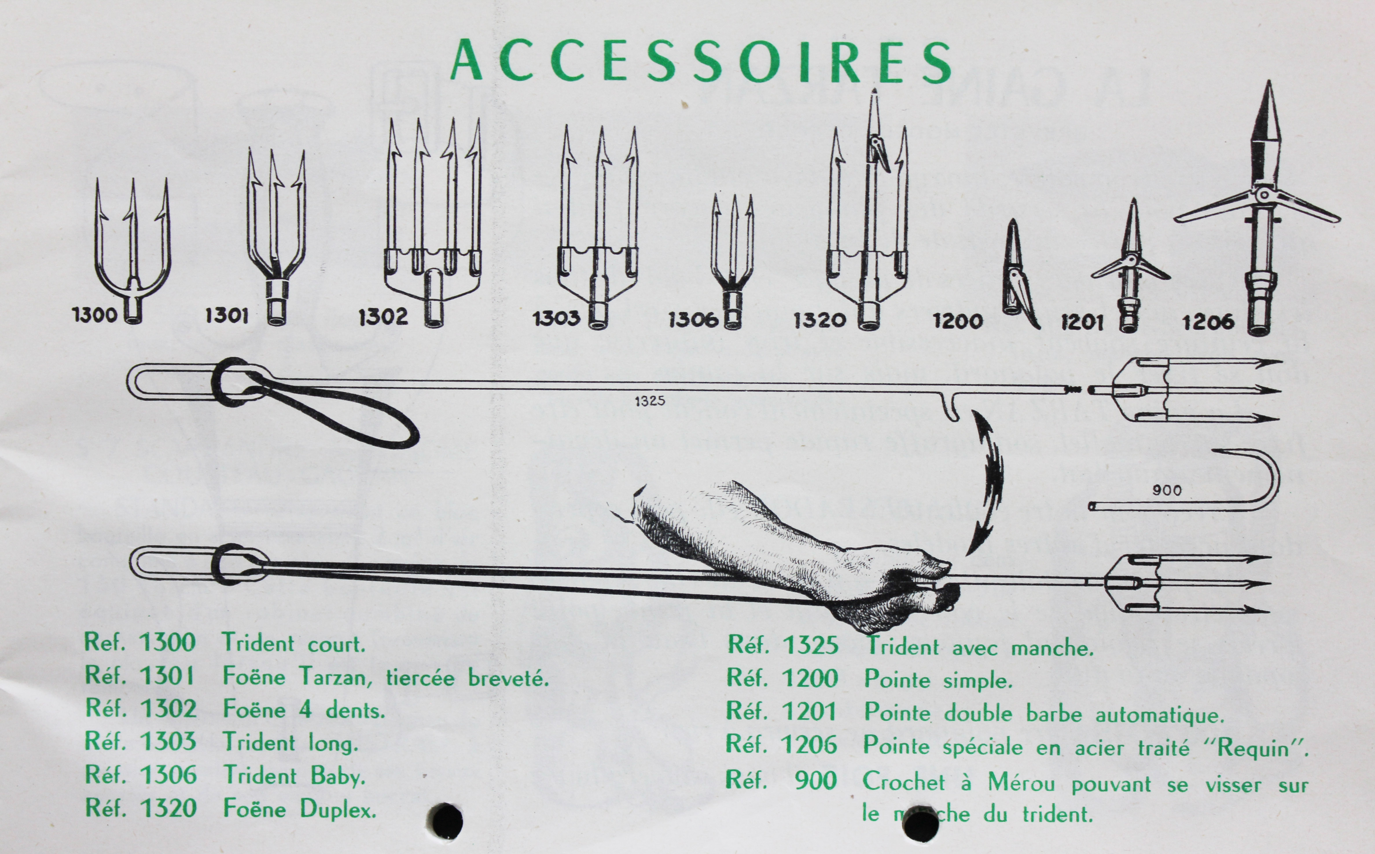 Catalogue Beuchat